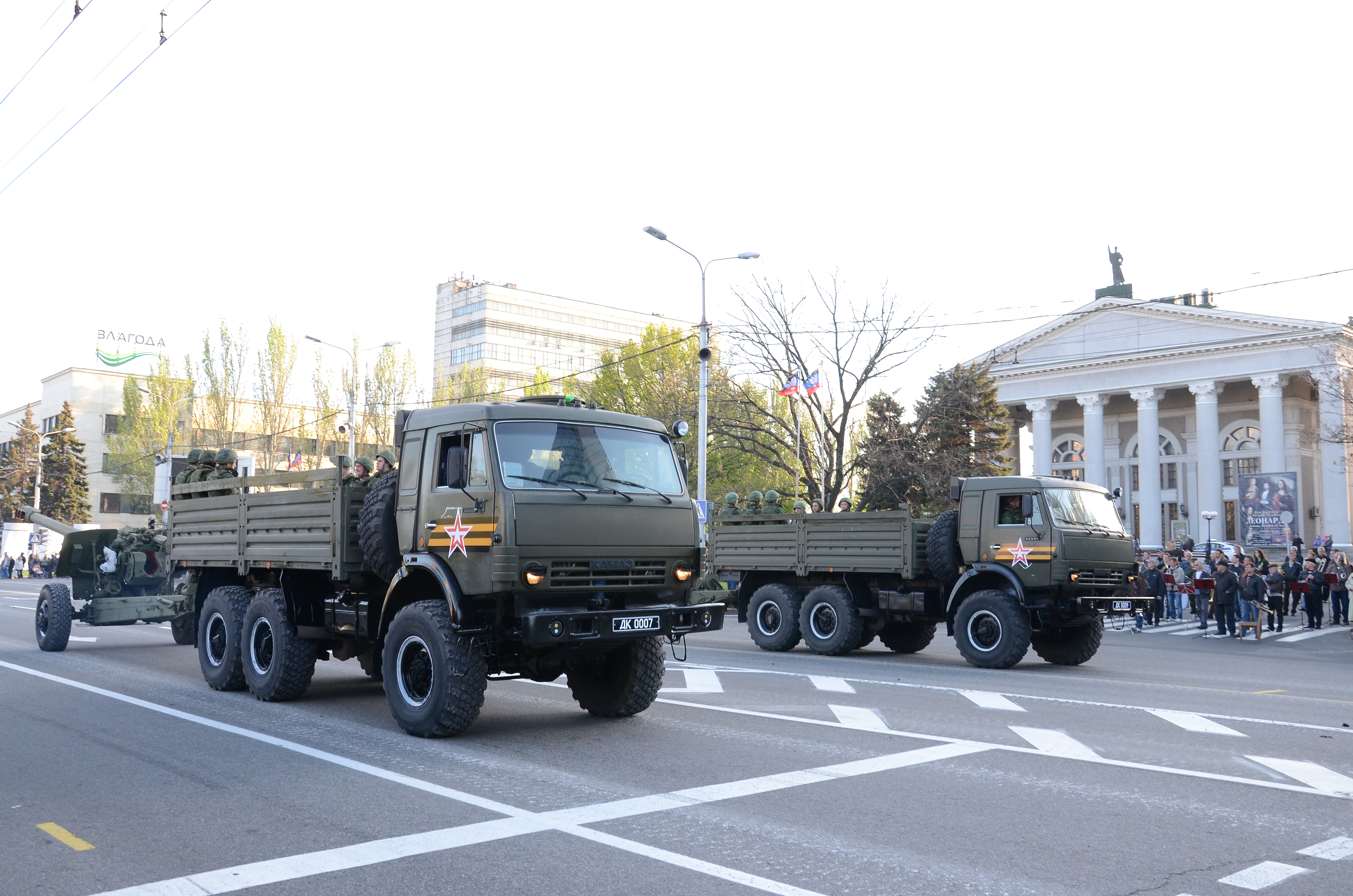 Репетиция парада в честь дня Победы в Донецке